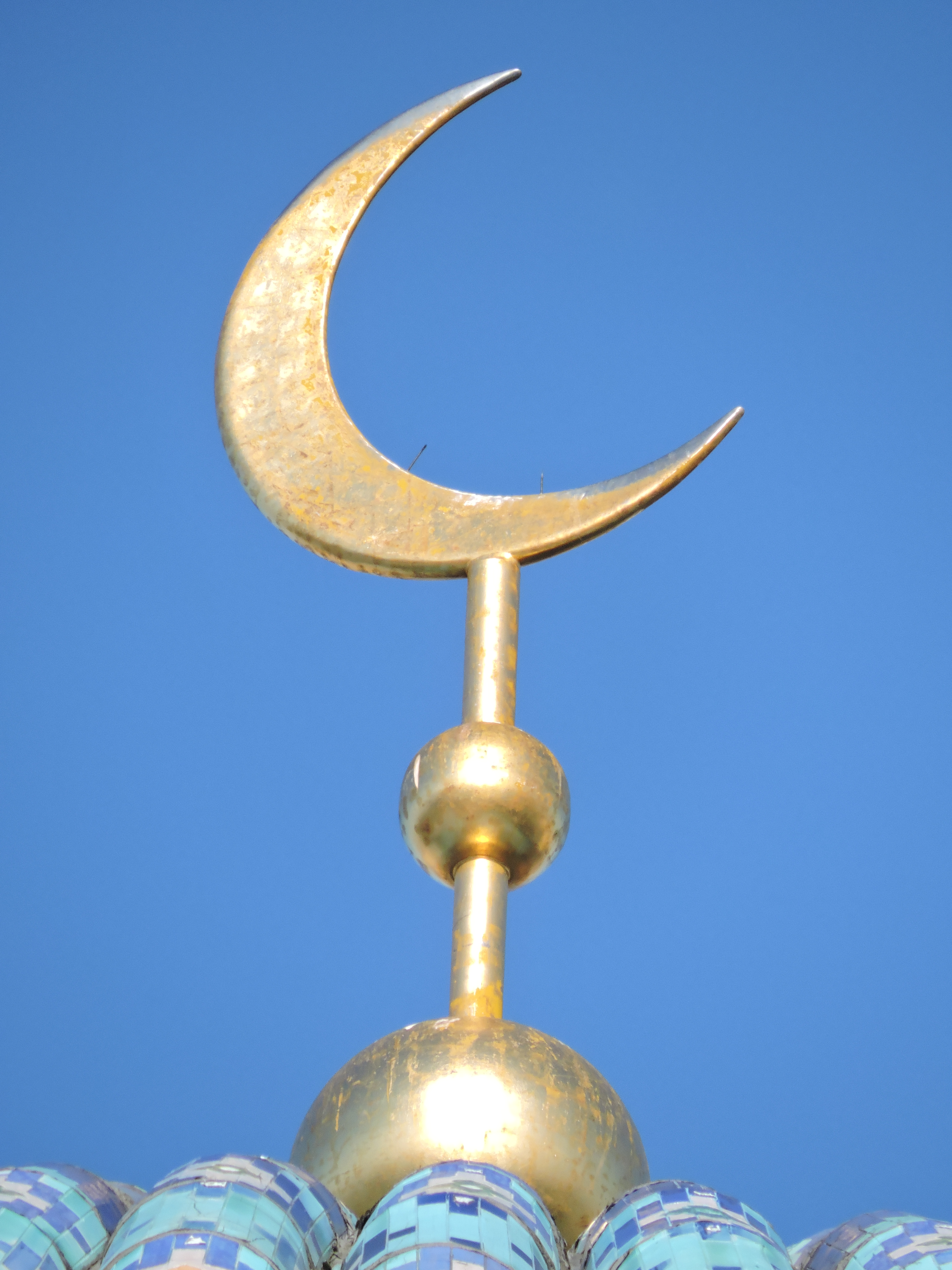 Полумесяц, венчающий главный купол соборной мечети Петербурга